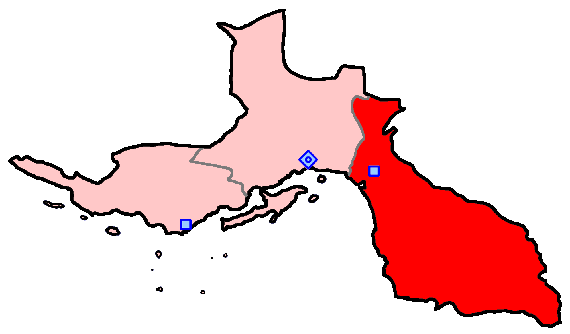 حوزهٔ انتخاباتی میناب و رودان و جاسک و سیریک برای انتخابات مجلس شورای اسلامی